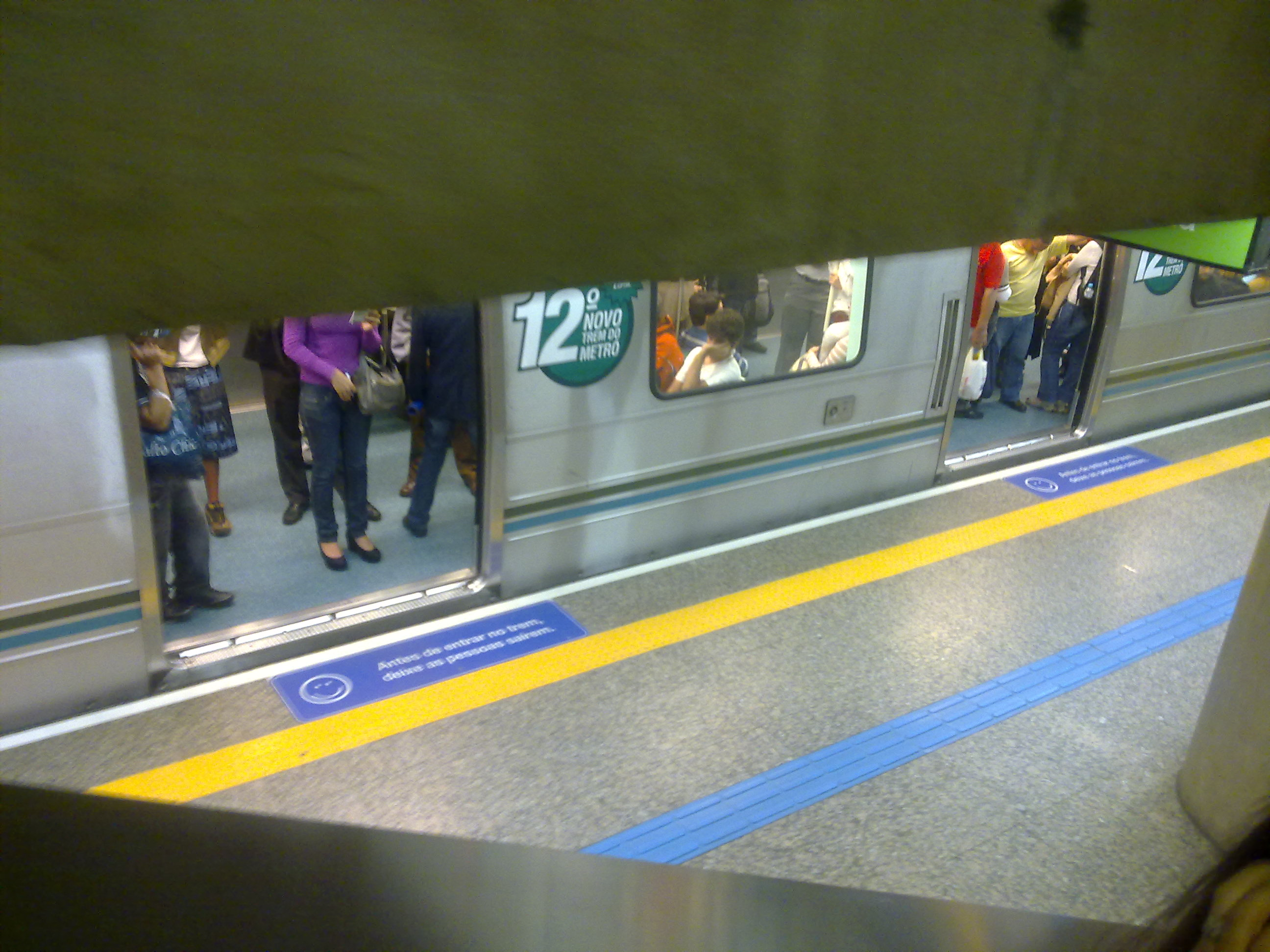 Foto da estação Brigadeiro do Metrô de São Paulo, Brasil